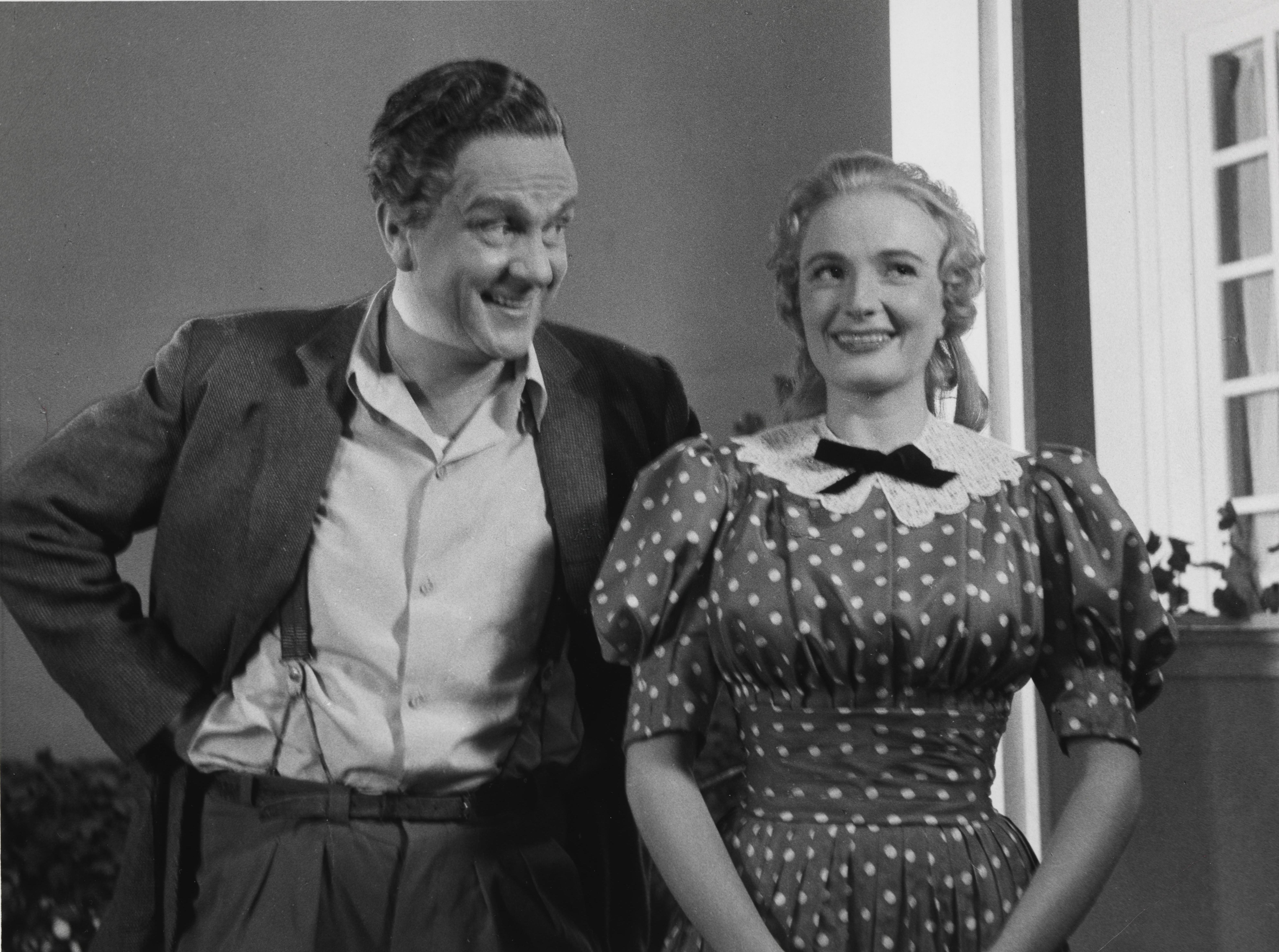 Bildet er hentet fra Nasjonalbibliotekets bildesamling Depicted person: Christensen, Bab Depicted person: Halvorsen, Stein Grieg